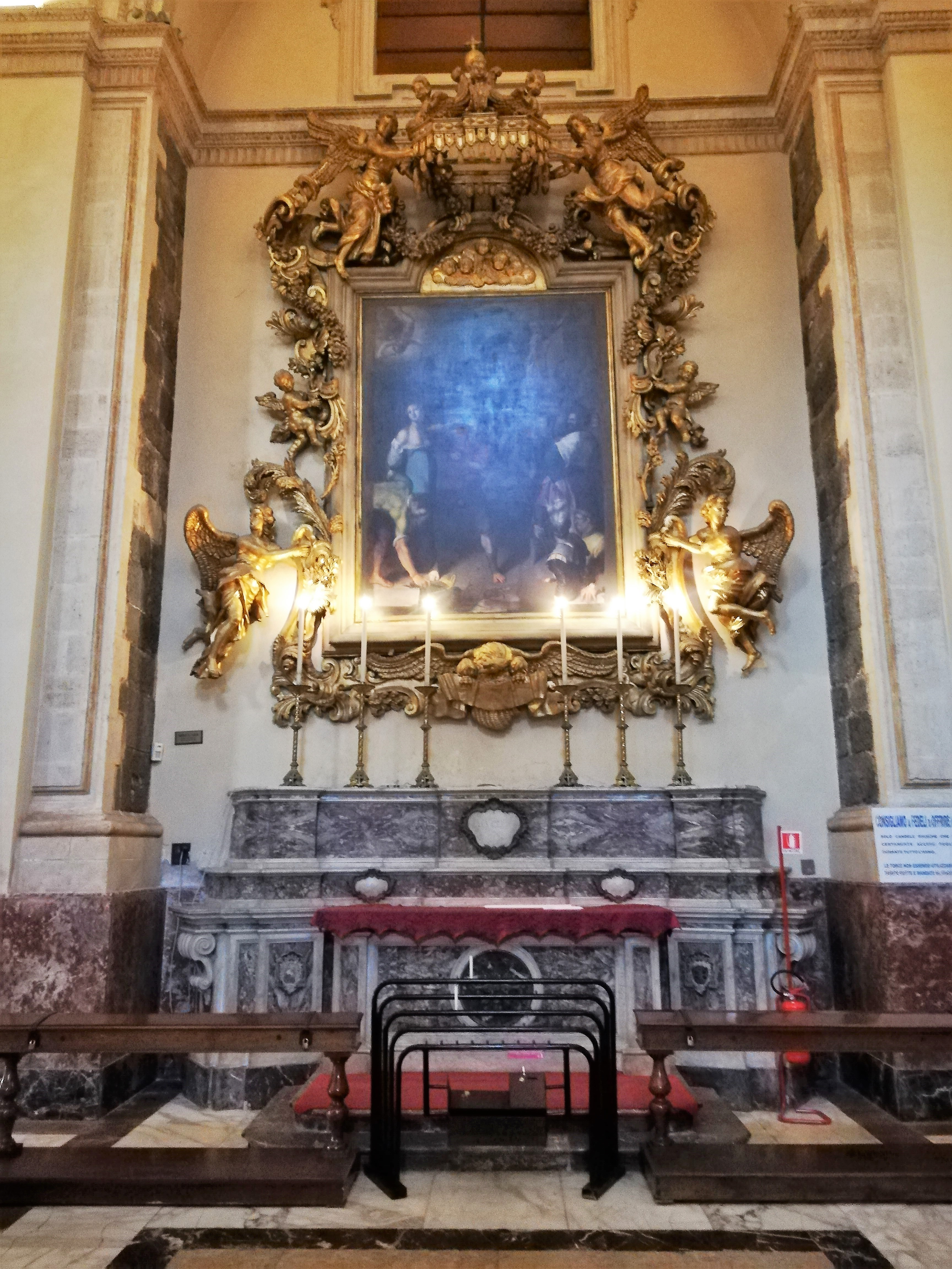 Cappella di Sant'Agata, dipinto raffigurante il Martirio di Sant'Agata, opera di Filippo Paladini.